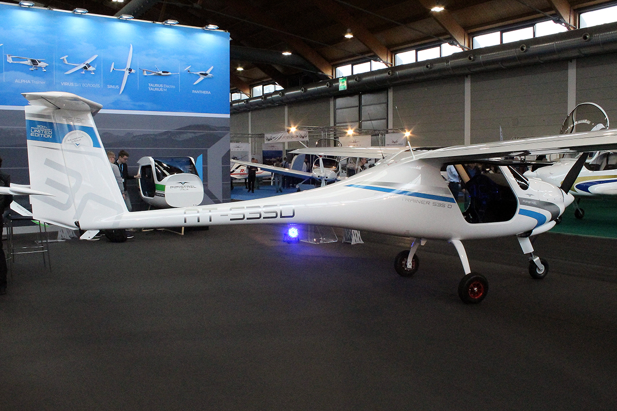 Unknown Pipistrel Alpha Trainer 535D @ Friedrichshafen 10/04/2019